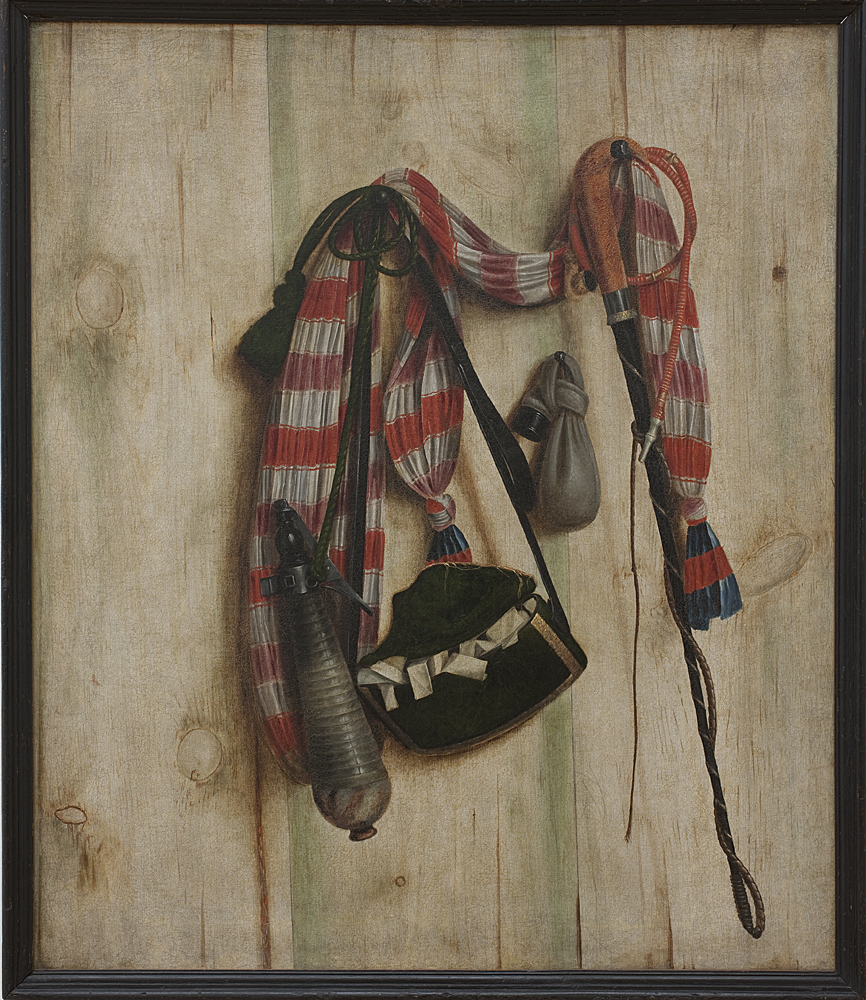 Cornelius Norbertus Gijsbrechts (1657-1683), Trompe l'oeil med ridepisk og brevtaske, 1672